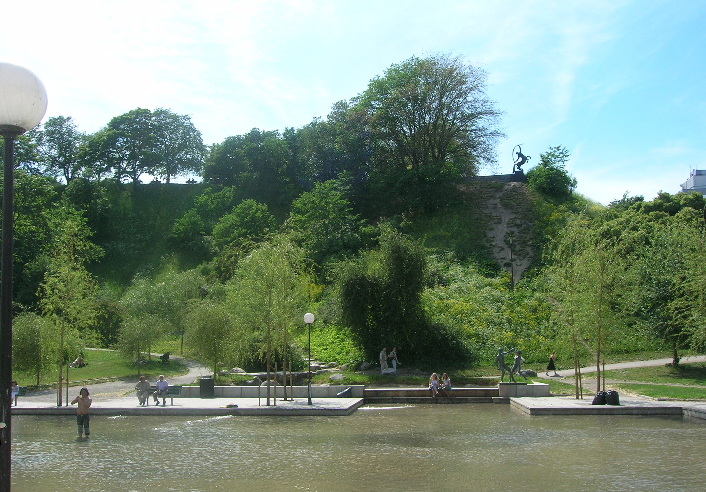 Observatoriekullen sedd från Sveavägen, Stockholm, Sweden.